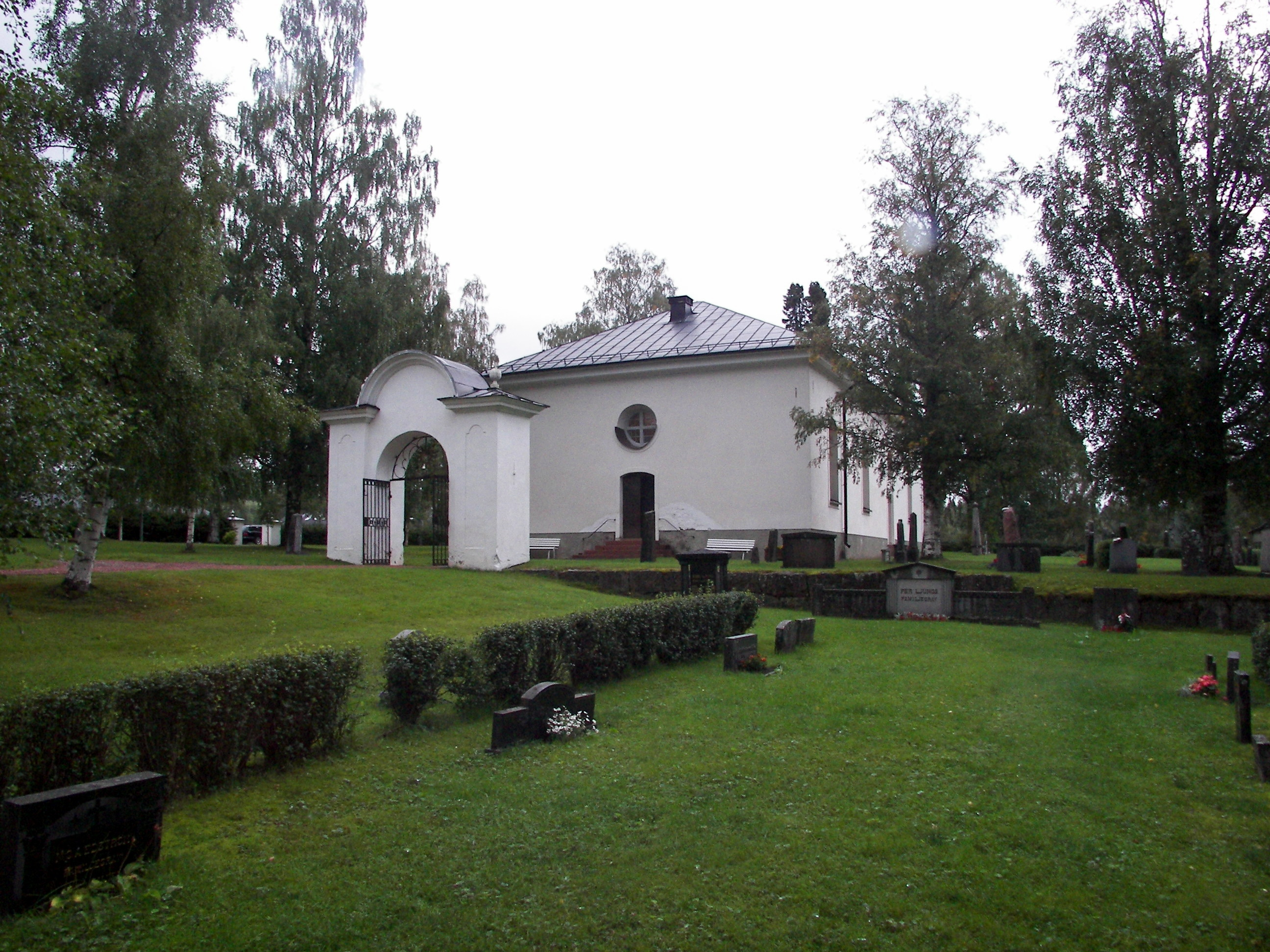 Fors kyrka i Bispgården.